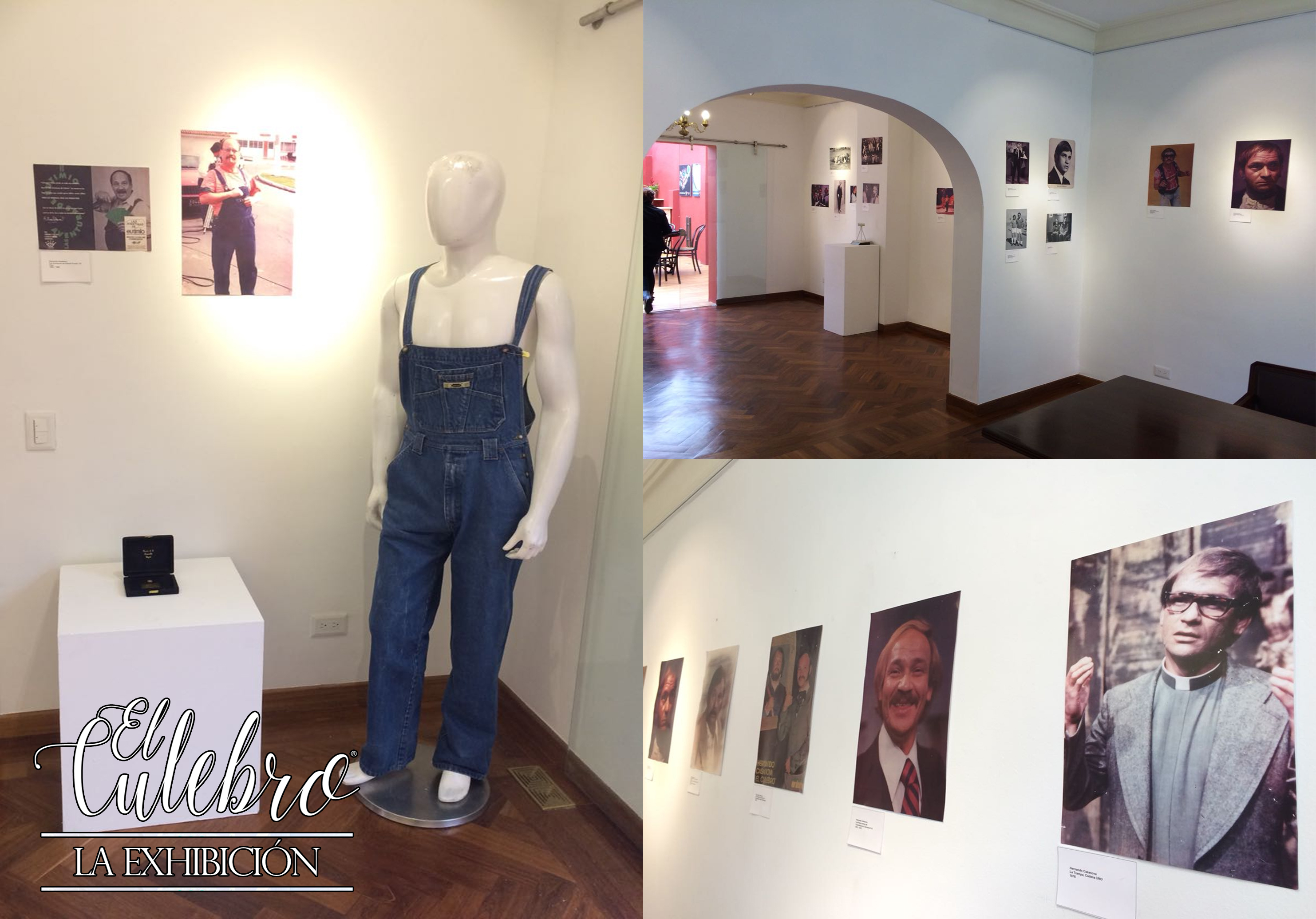 Galeria de fotos de la exhibición de actor colombiano Hernando Casanova, llevada a cabo en la ciudad de Bogotá.